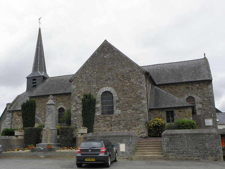 Vue méridionale de l'église Saint-Martin-de-Tours de Plesder (35).